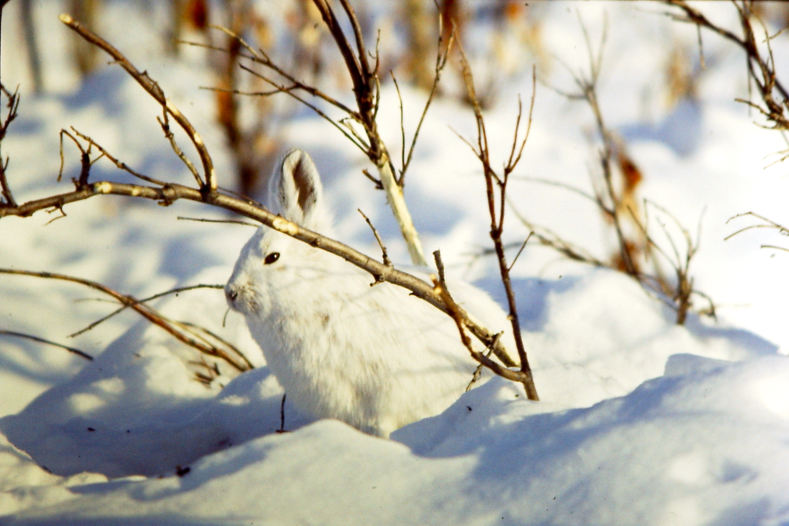 Schneeschuhhase. Brooks Range, Alaska.